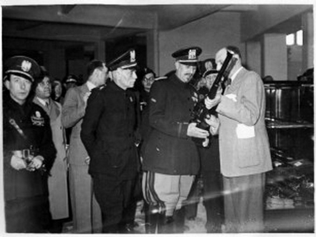 Fiera di Milano – Campionaria 1941 – Visita del conte di Torino Vittorio Emanuele di Savoia e del ministro delle comunicazioni Giovanni Host Venturi in occasione della inaugurazione